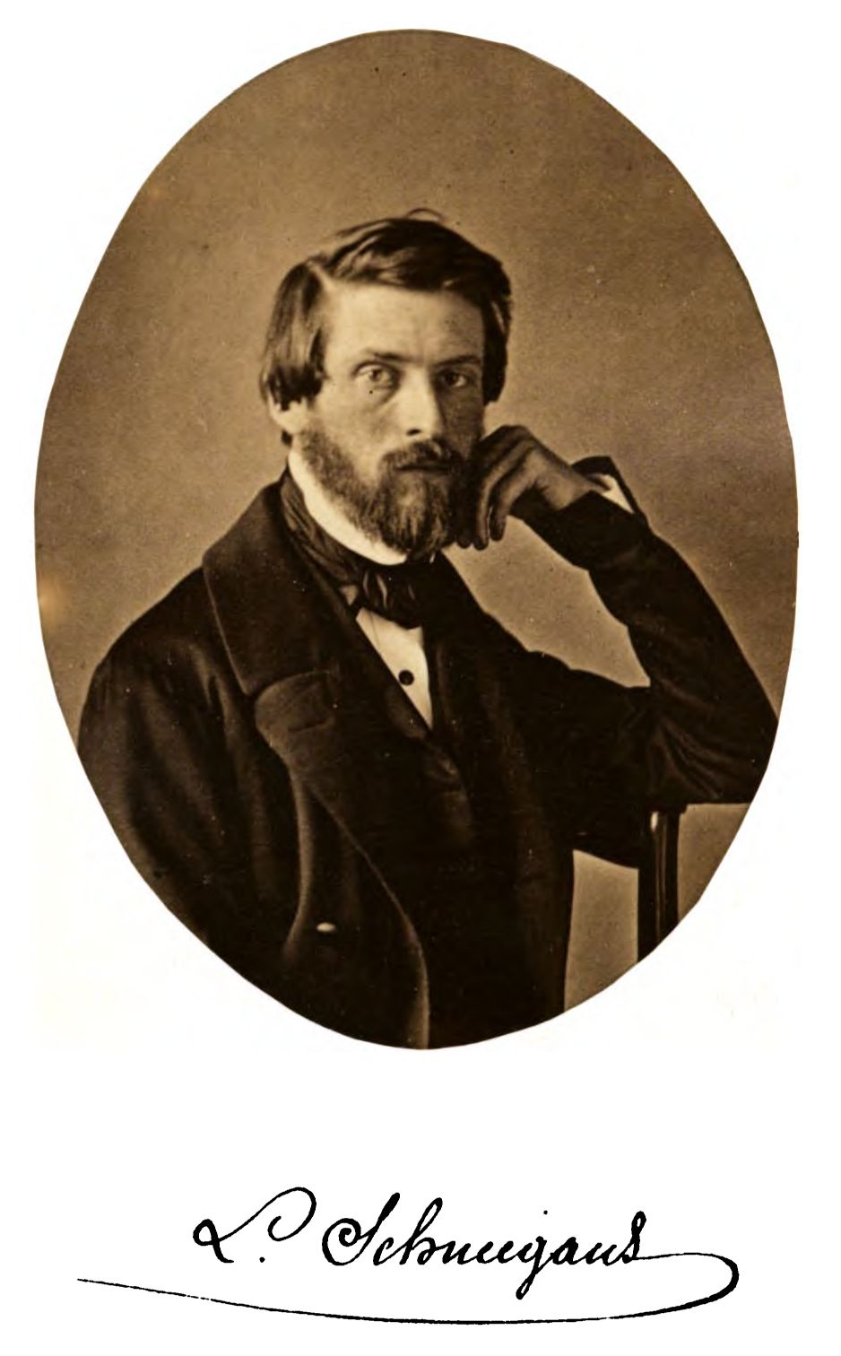 Porträt: Ludwig Schneegans (1812–1858). In: Alsatia. Beiträge zur elsässischen Geschichte, Sage, Sitte und Sprache, herausgegeben von August Stöber. Neue Folge. 1. Abtheilung. 1862-1867. J. P. Risler und Komp., Mülhausen 1868